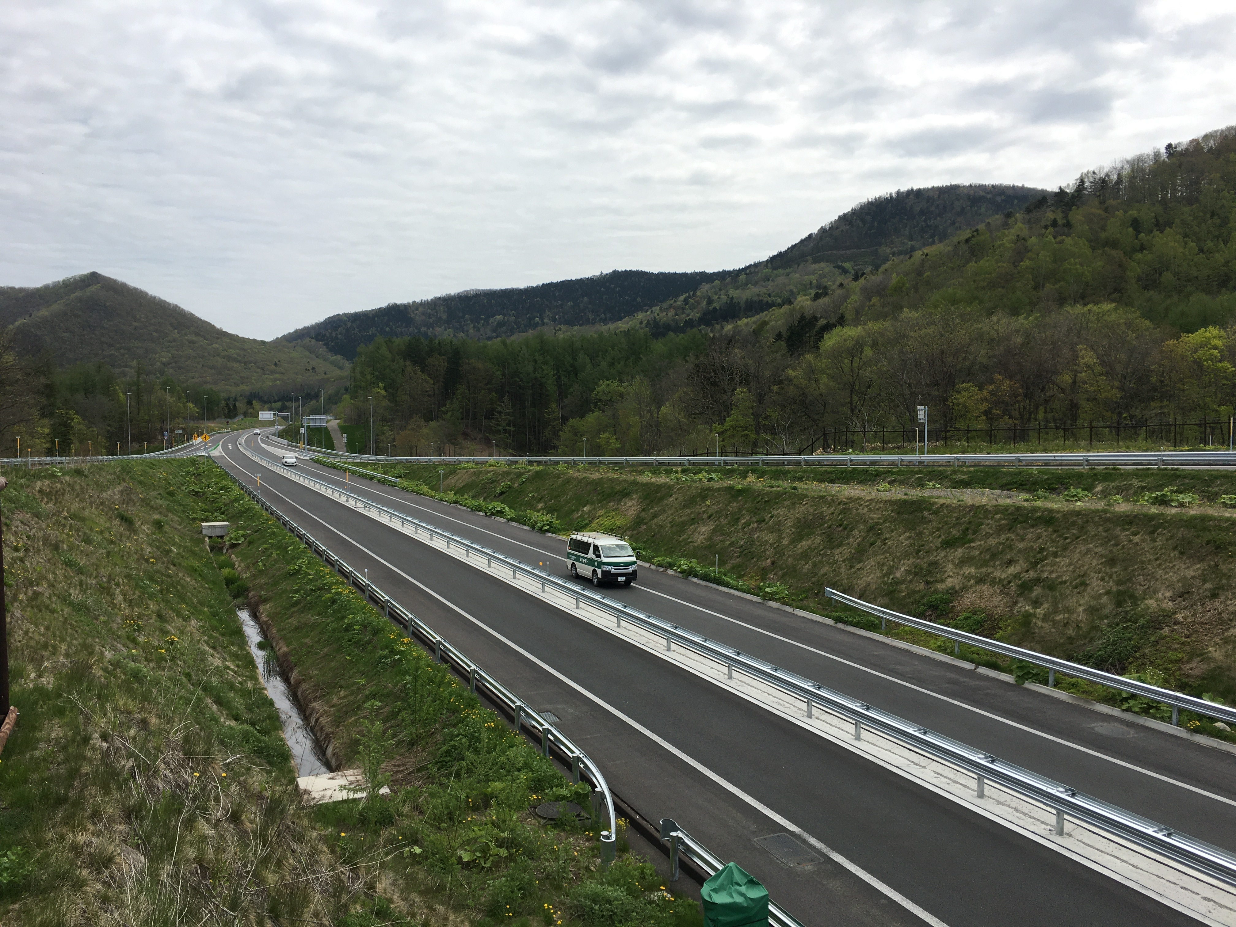 旭川紋別自動車道紋別方面 遠軽瀬戸瀬インターチェンジ - 遠軽インターチェンジ間（紋別郡遠軽町）